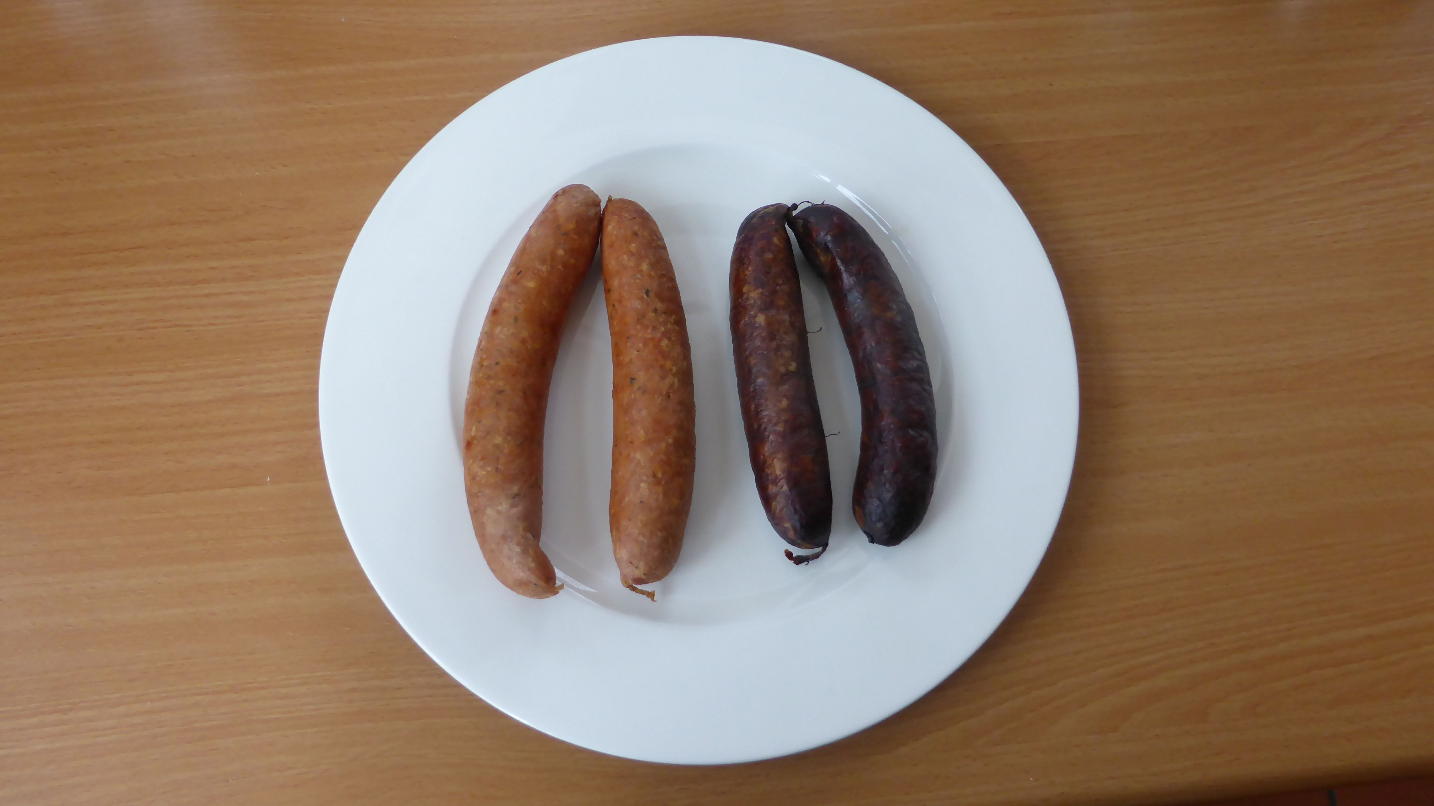 Gekochte und geräucherte Oberpfälzer